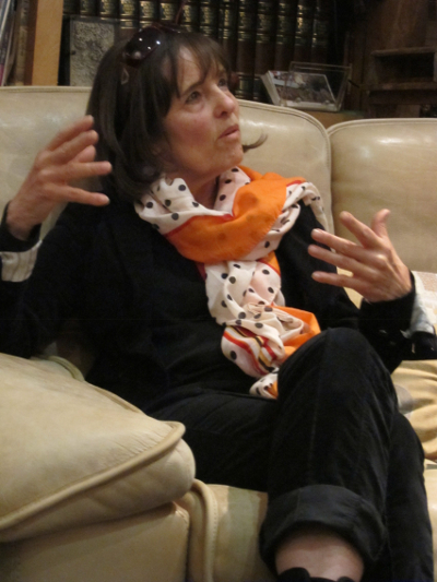 L'artiste pop américaine Jann Haworth à Paris en septembre 2012.